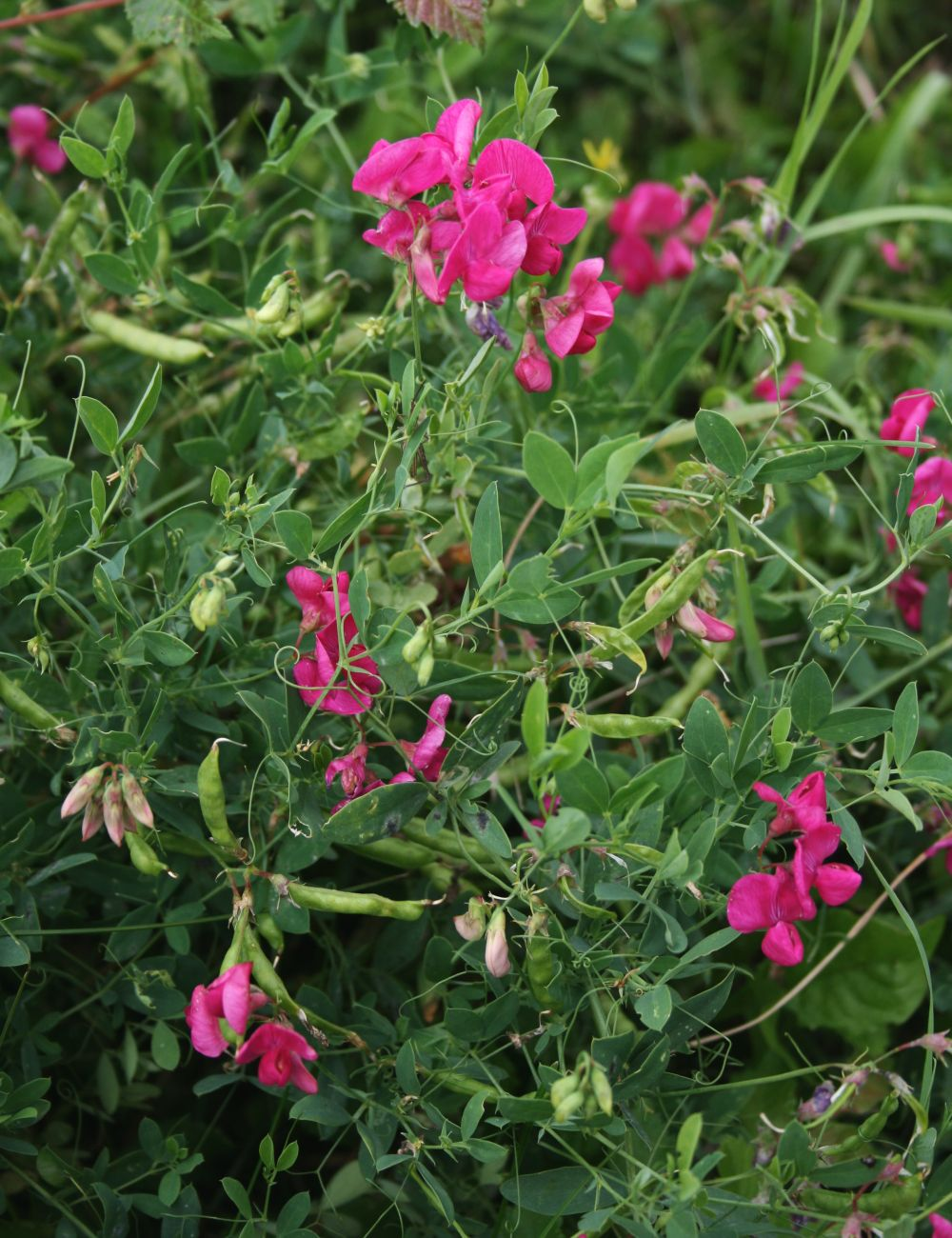 Knollen-Platterbse (Lathyrus tuberosus), Hülsenfrüchtler (Fabaceae), Schmetterlingsblütler (Faboideae) - Österreich/Austria/Autriche: Niederösterreich, Wiener Becken, SE Leobersdorf